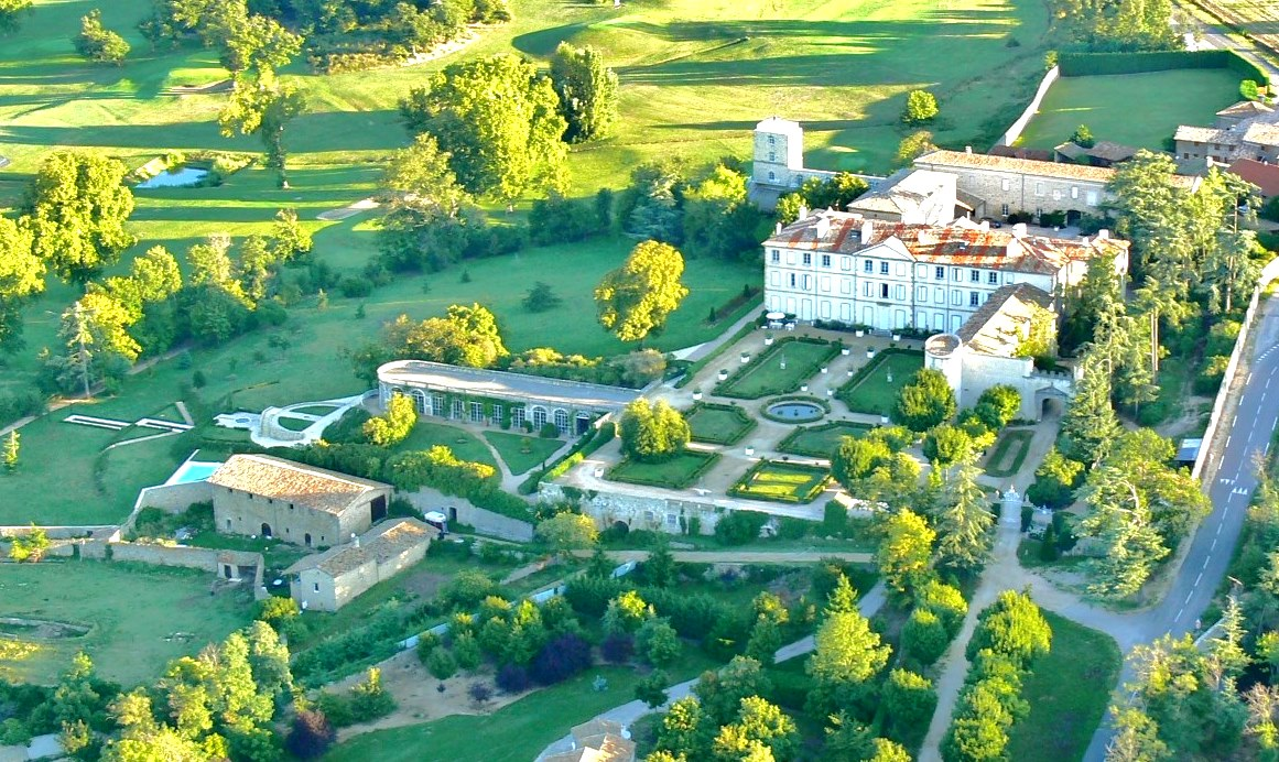 Saint-Clair (Ardèche) Gourdan vue aérienne